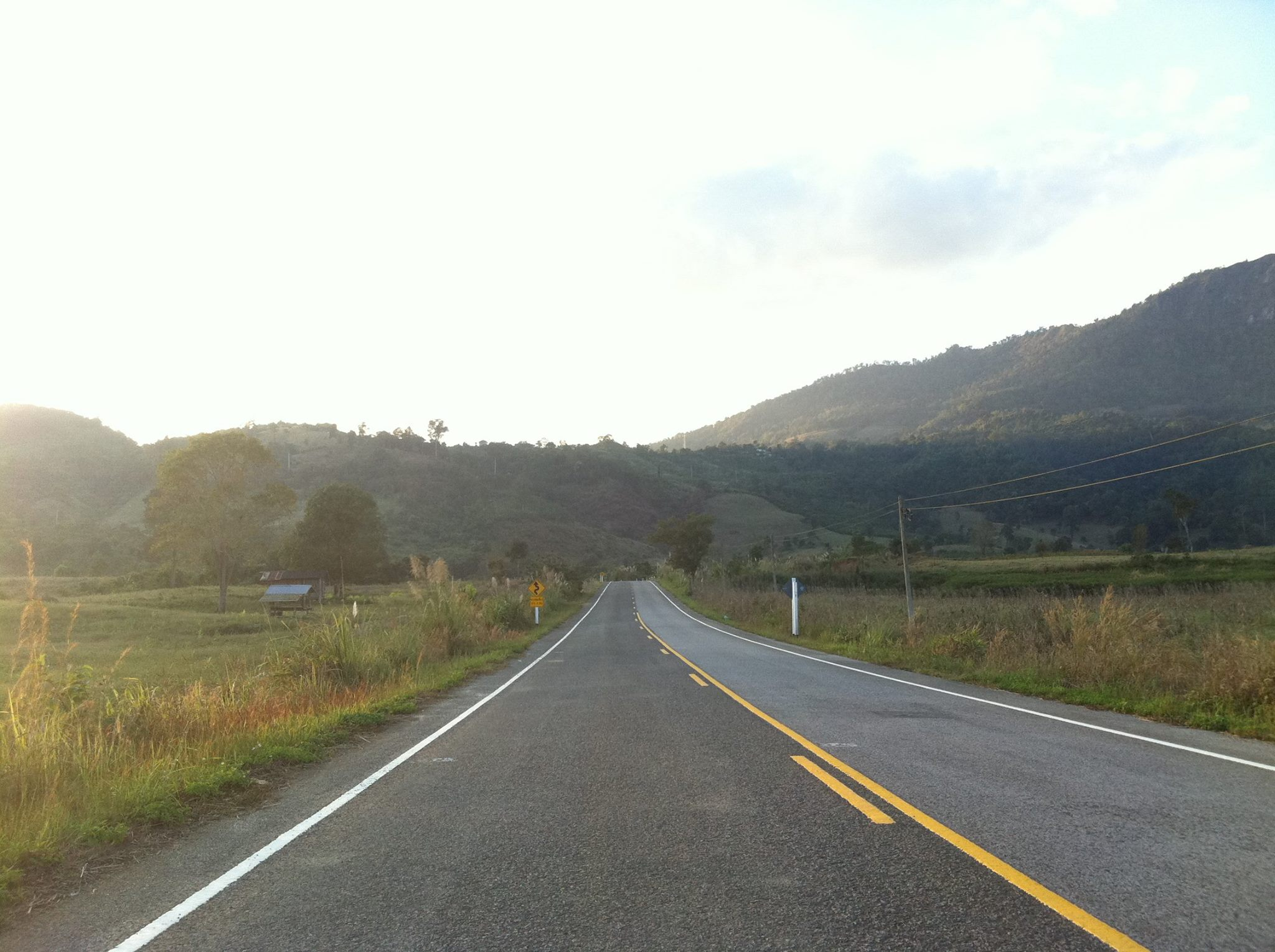 ทางหลวงแผ่นดินหมายเลข 1148 ตอน นาไร่หลวง-ห้วยอ่วม